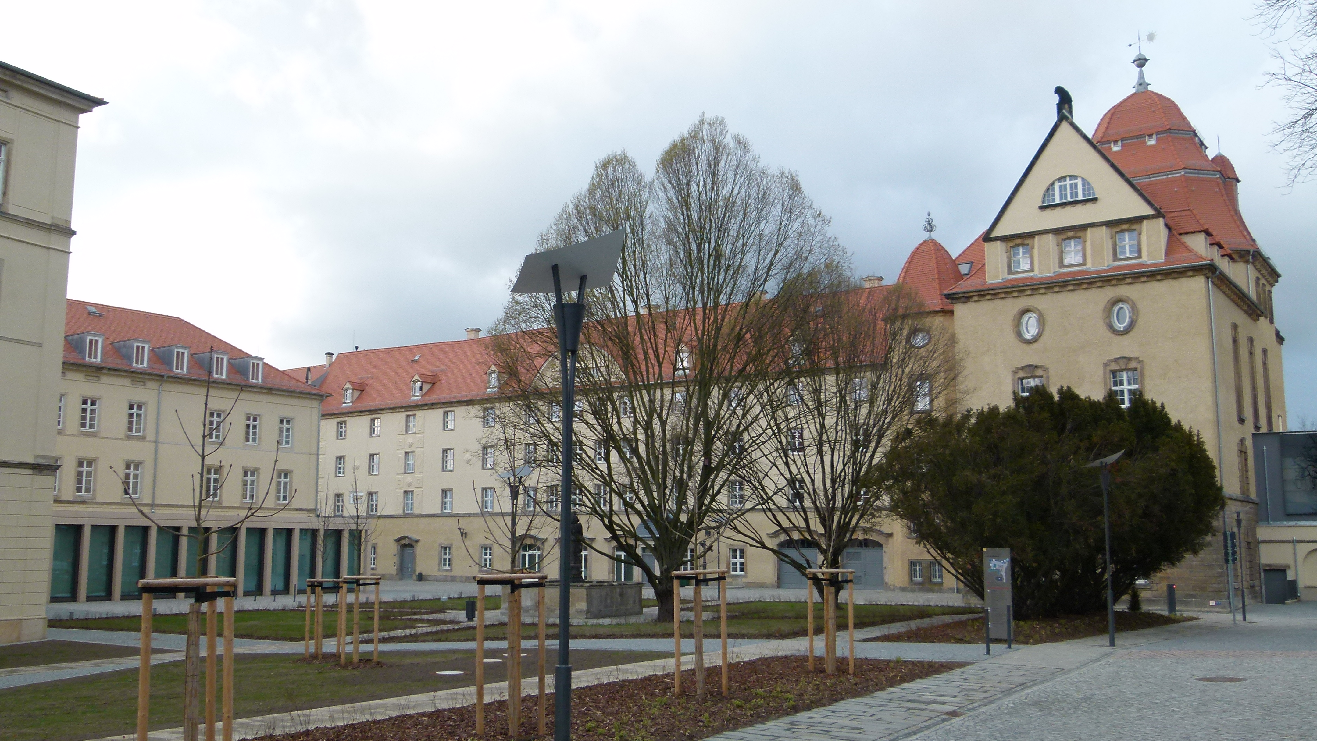 Denkmalgeschützter Komplex, Schloss Sonnenstein, Schlosshof 2-4, Landratsamt Pirna, Sachsen